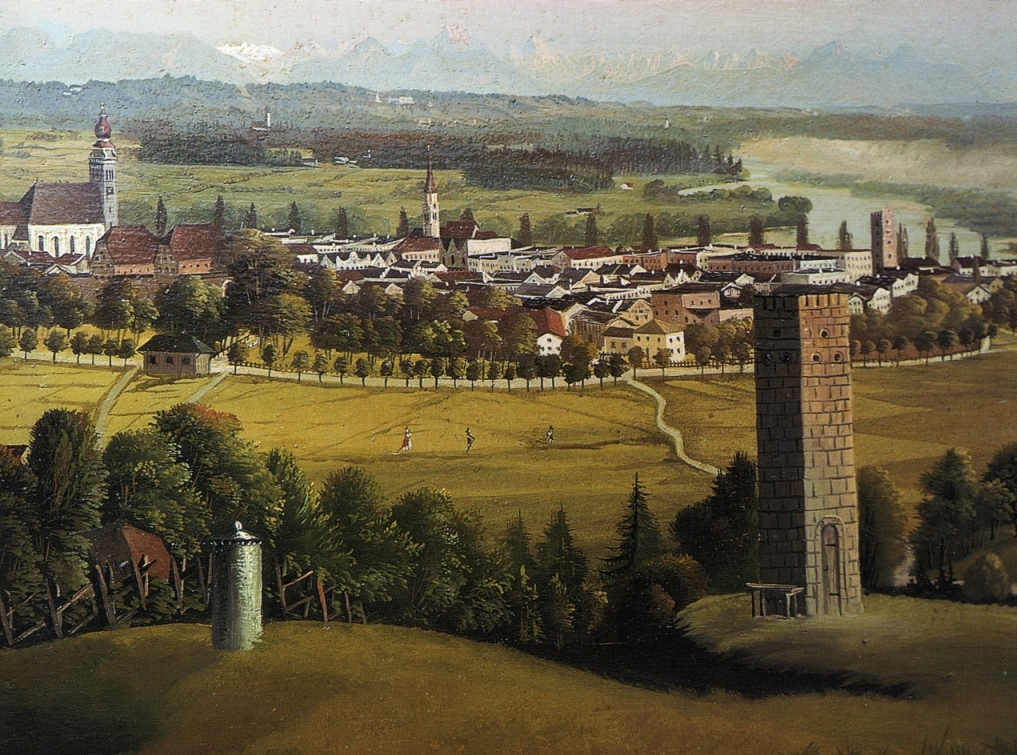 Stadtansicht von Mühldorf entstanden um 1860